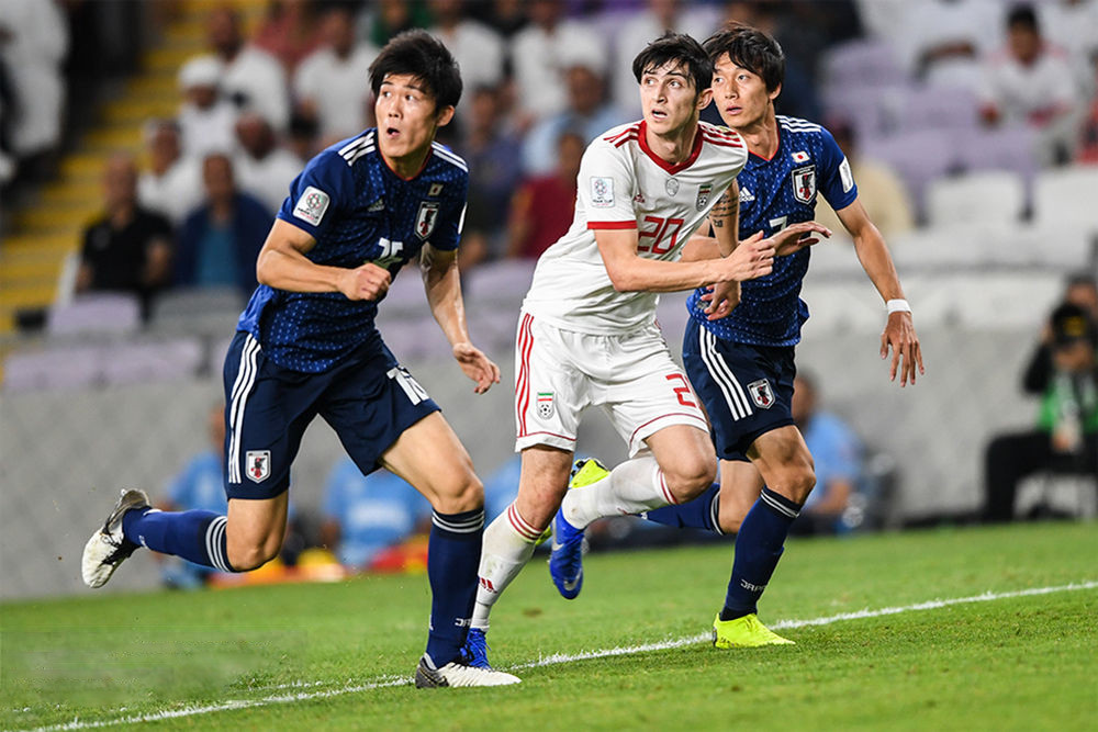 دیدار تیم‌های ملی فوتبال ایران و ژاپن دیدار تیم های ملی فوتبال ایران و ژاپن در مرحله نیمه نهایی هفدهمین دوره جام ملت های آسیا ۲۰۱۹ امارات ، با برتری ۳ بر صفر ژاپن در ورزشگاه بن زاید شهر العین برگزار شد.